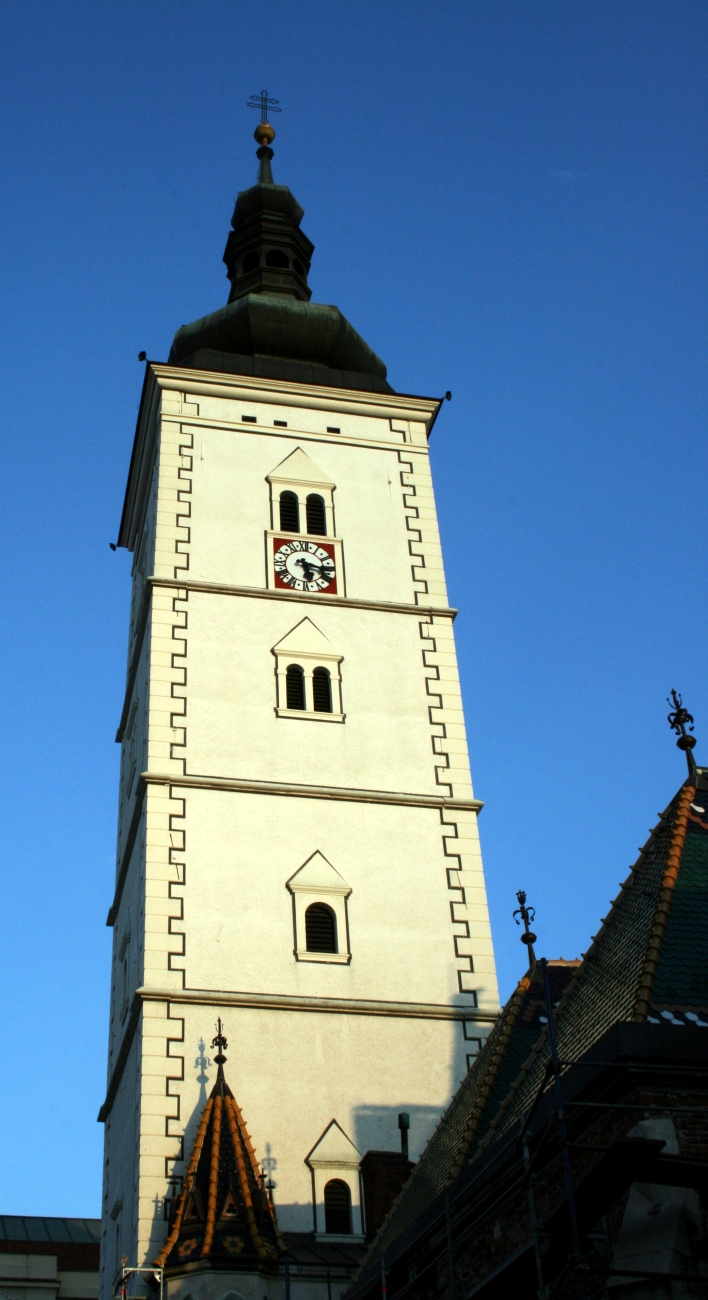 Zvonik crkve Svetog Marka (A. Macetti i Machiedo 1660. - 1725.)